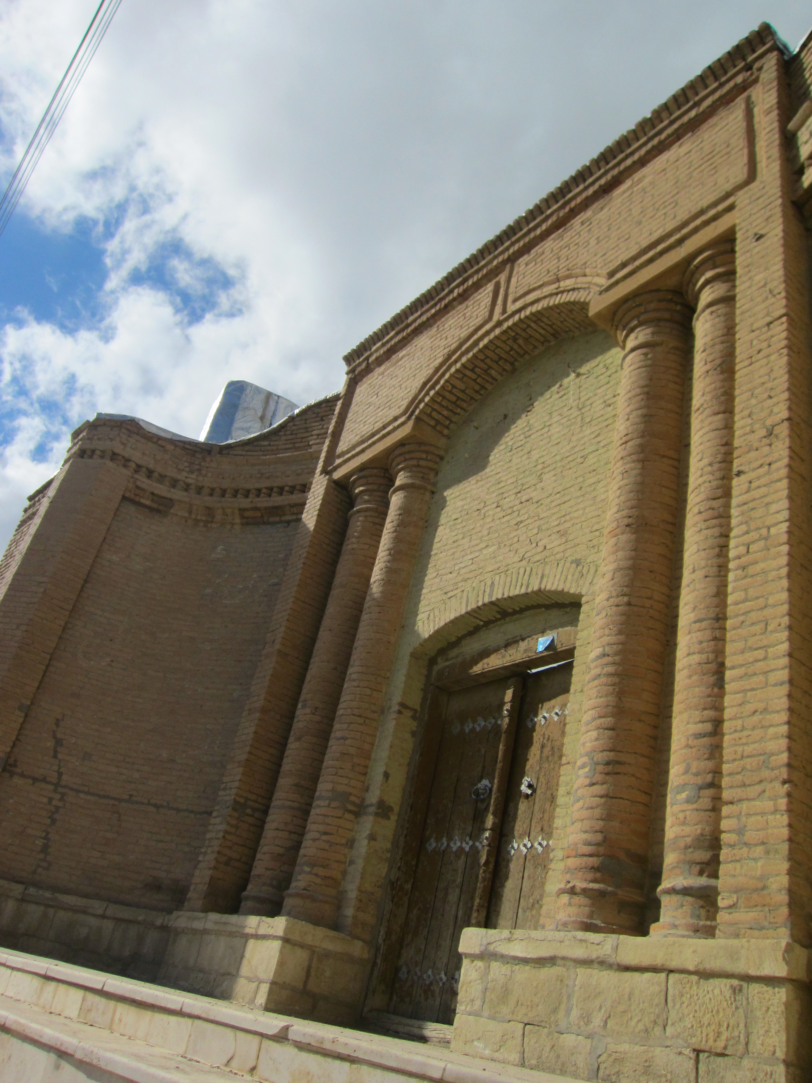 سر در قلعه اربابی در تکاب